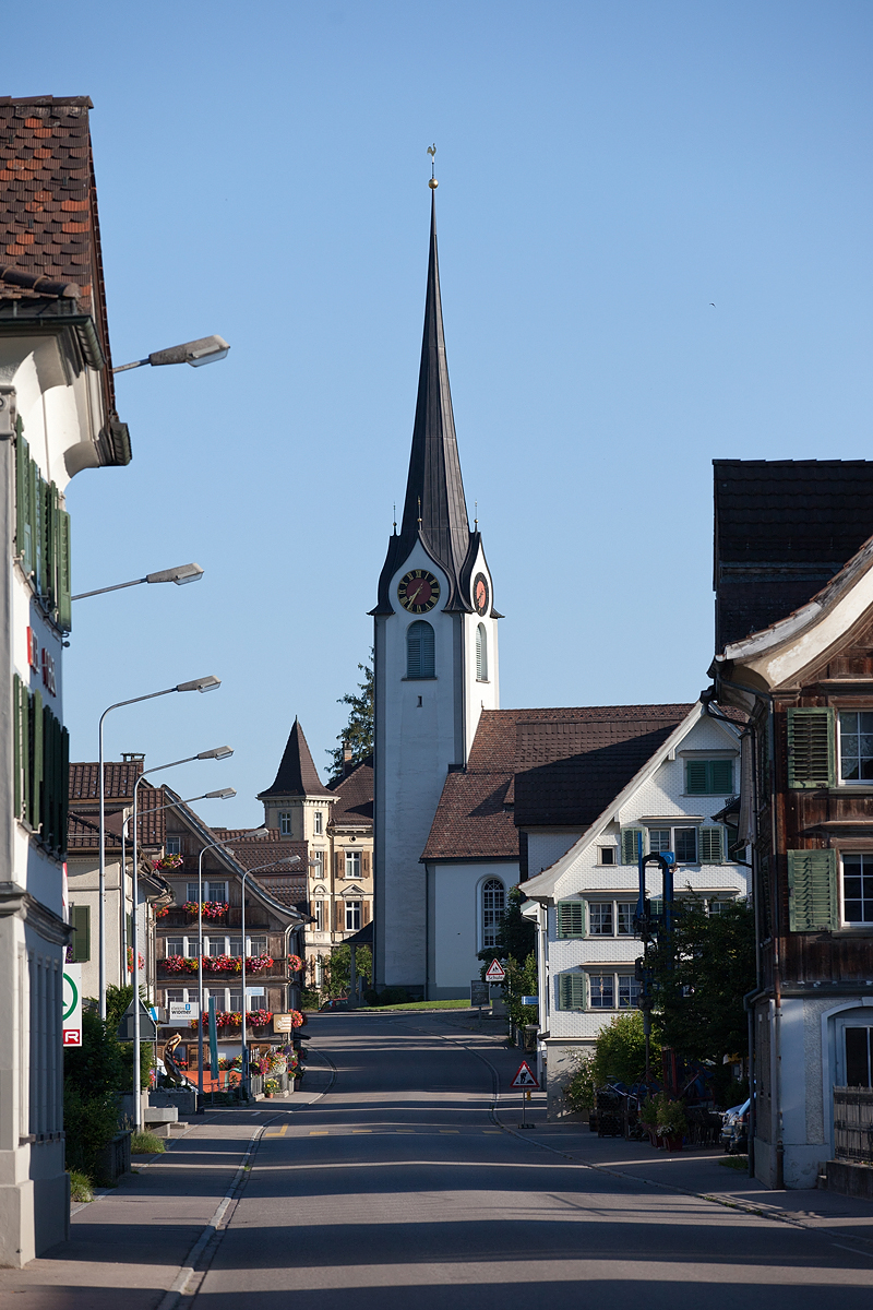 Ebnatstrasse mit Blick zur Reformierten Kirche von Ebnat-Kappel